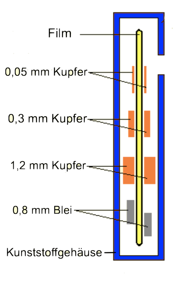 Aufbau eines Filmdosimeters